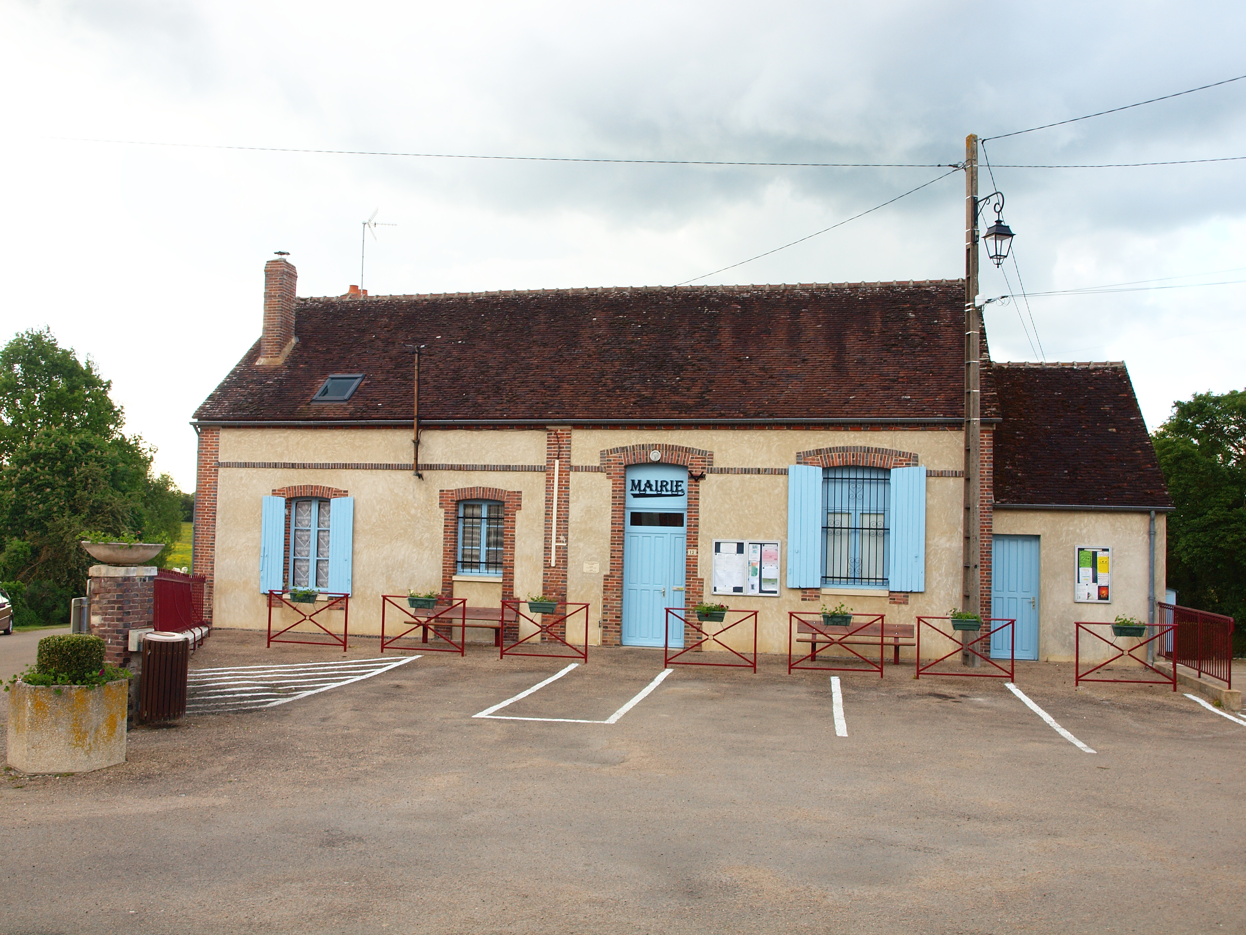 Saint-Martin-d'Ordon (Yonne, France)